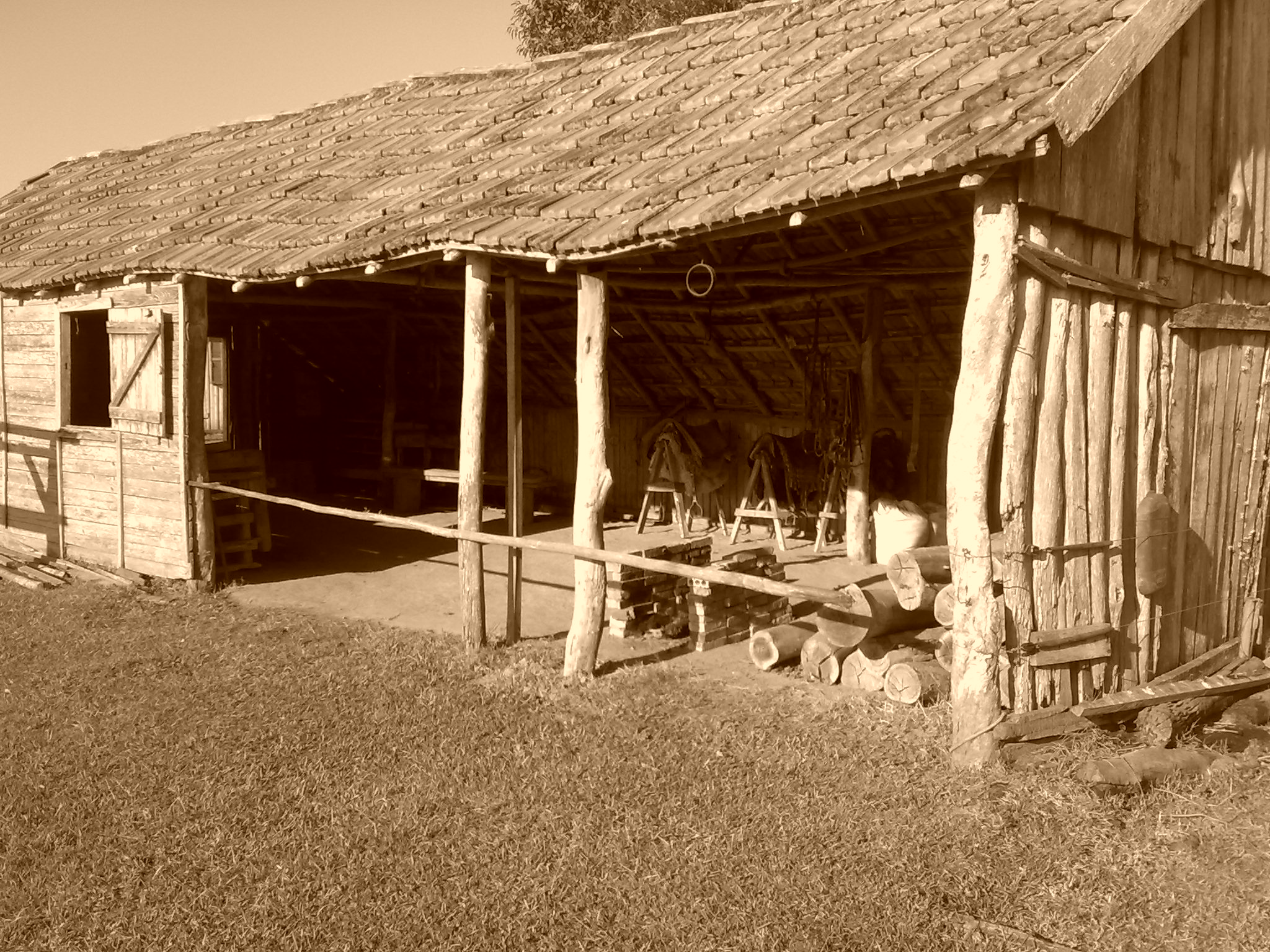 Galpão velho